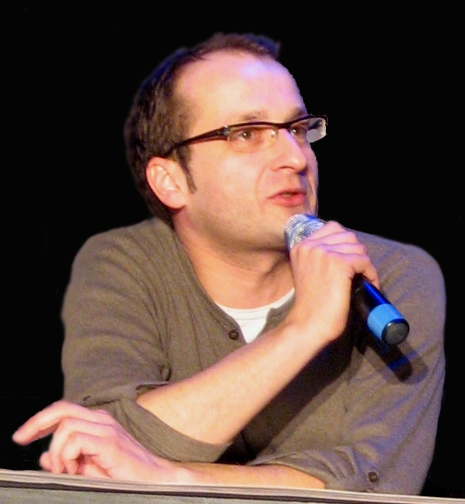 Robert Górski